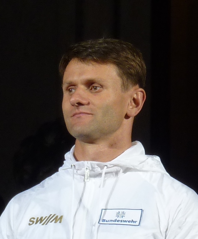 Oliver Koenig (startend für die LG Stadtwerke München) beim Jump & Fly 2012 in München